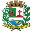 Brasão da cidade de Santa Albertina, SP